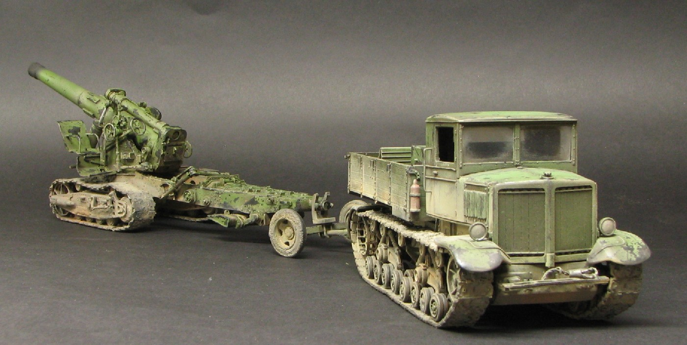 Model redukcyjny sowieckiego ciągnika artyleryjskiego Woroszyłowiec, skala 1/35